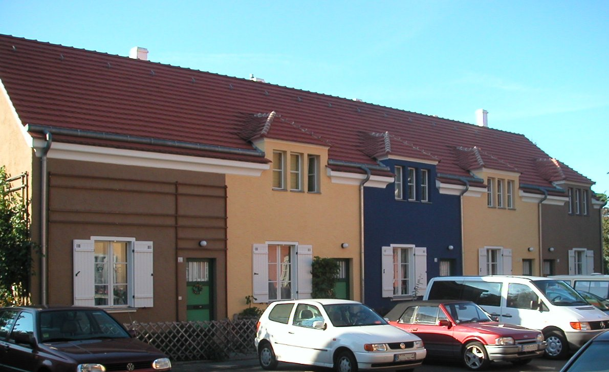 Tuschkastensiedlung, Gartenstadtweg, Berlin-Bohnsdorf